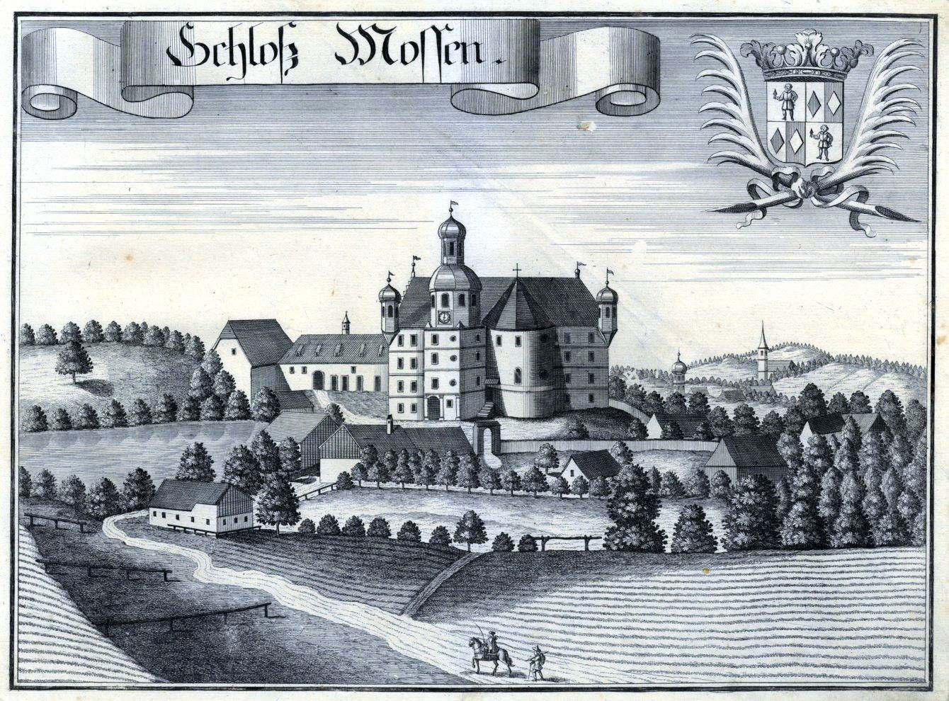 Schloß Kalling (irrtümlich als “Schloß Mossen” bezeichnet), aus : Beschreibung des Churfürsten- u. Hertzogthumbs Ober- und Nidern Bayrn. Rentamt Landshut, Gericht Dorfen, 1723